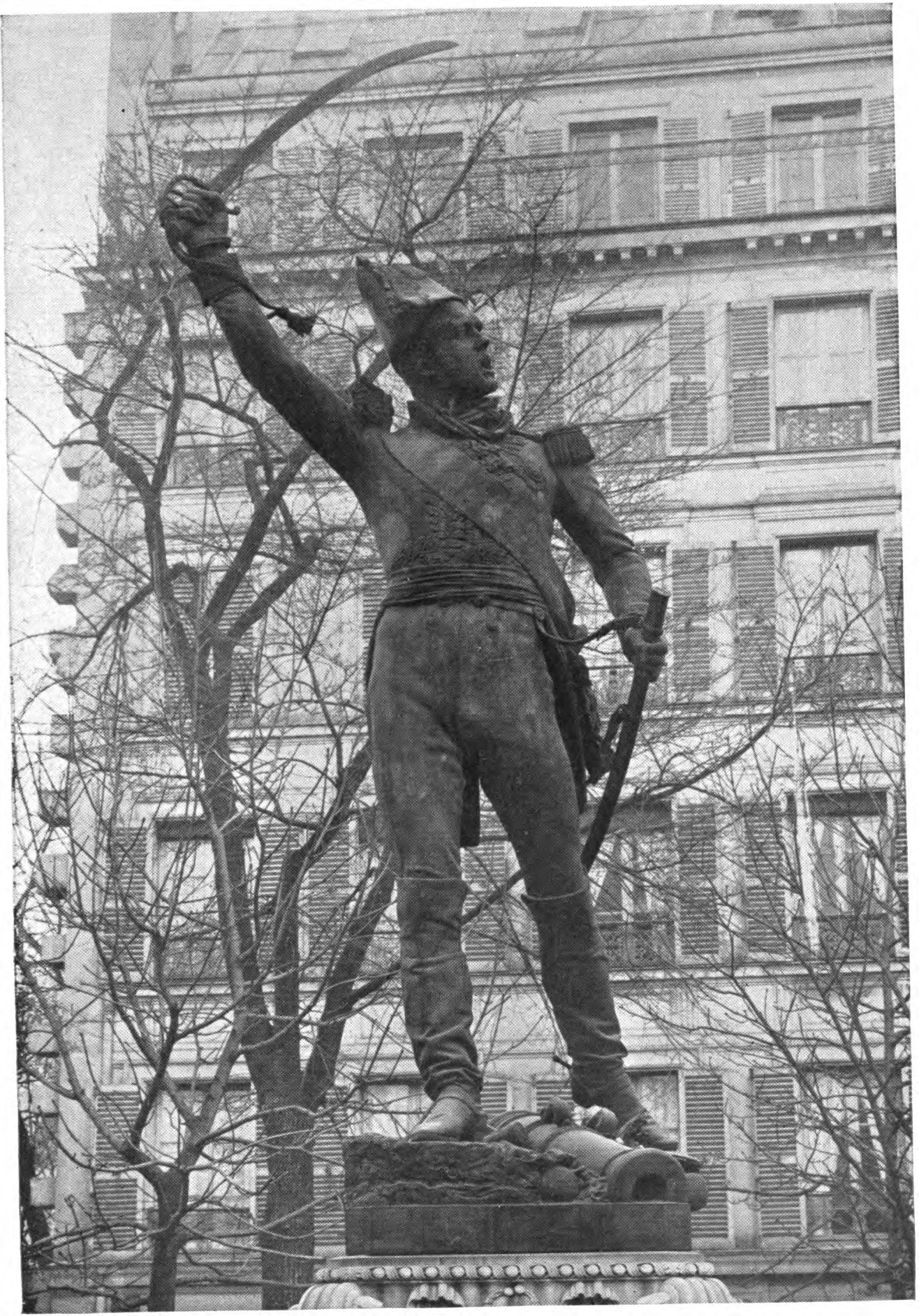 Rude, le Marécha Ney, cité par Auguste Rodin. Paru dans le livre L'Art, entretiens réunis par Paul Gsell, Grasset, 1911. page 77